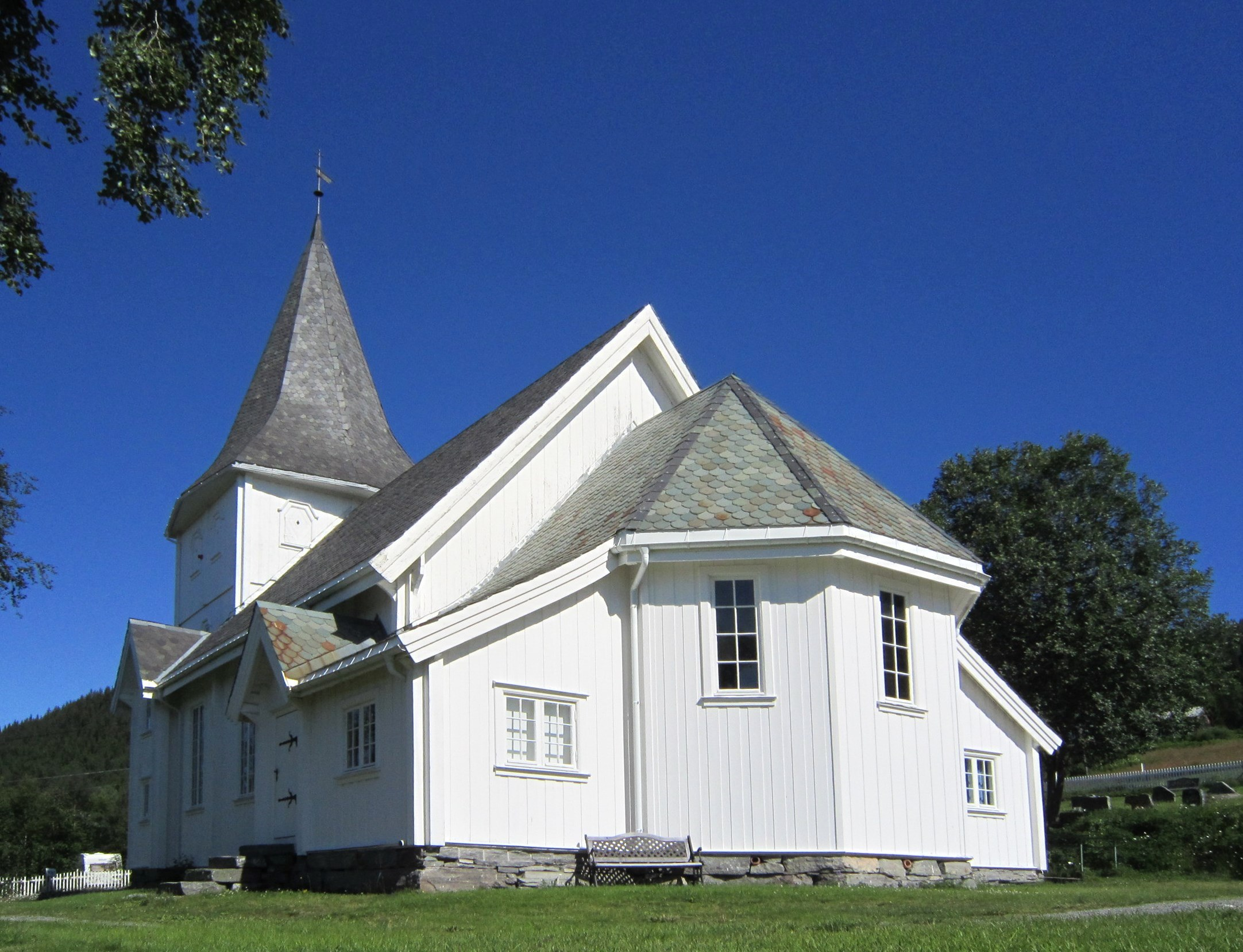 Lidar kirke, Øystre Slidre